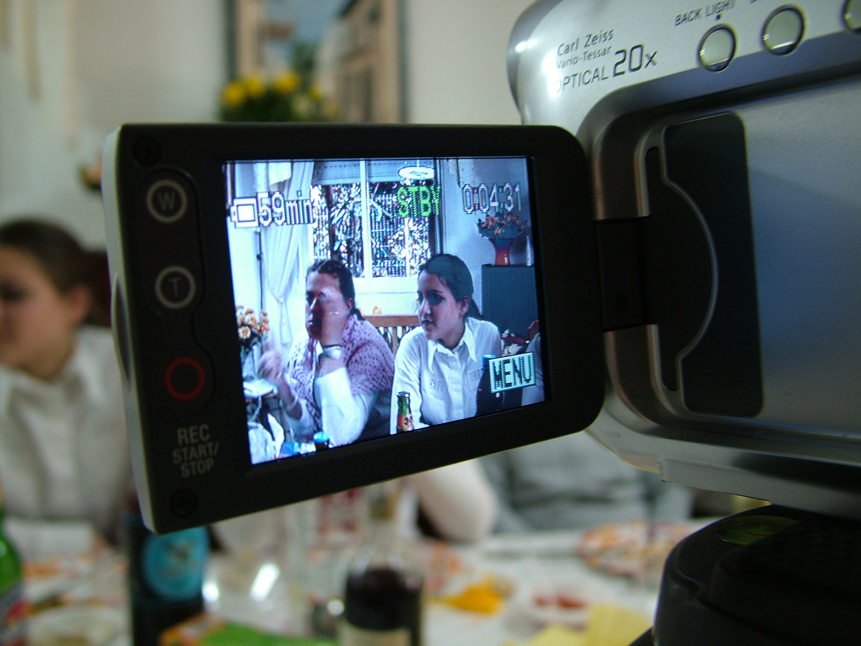 מסרטה ביתית